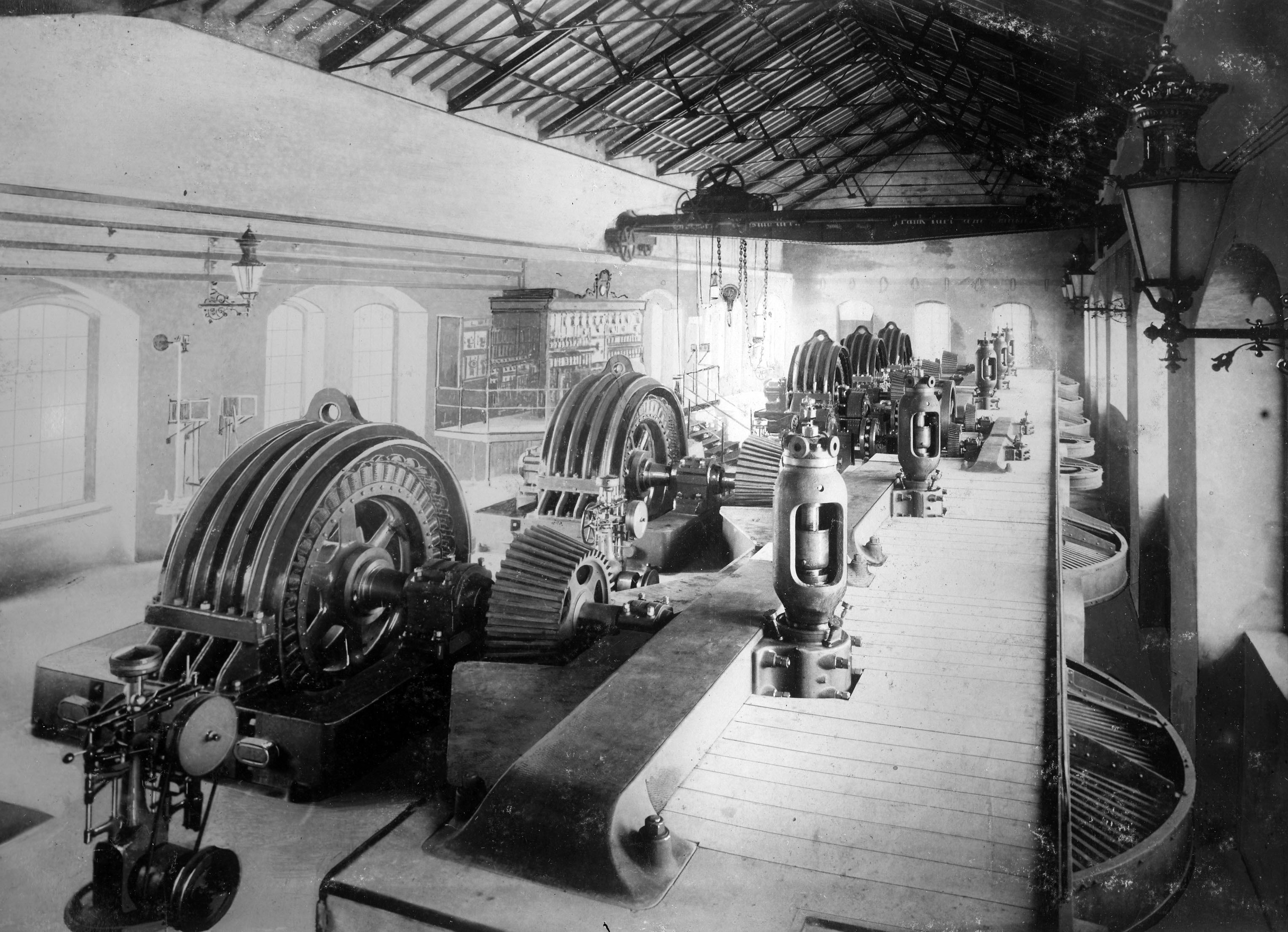 Maschinensaal des Krafterks Wynau mit vn Siemens & Halske gelieferter elektrischer Ausrüstung